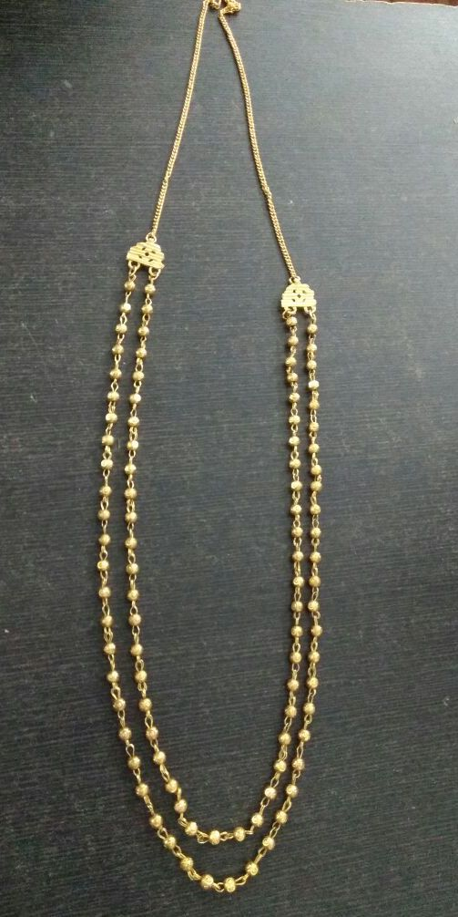 मोहनमाळ